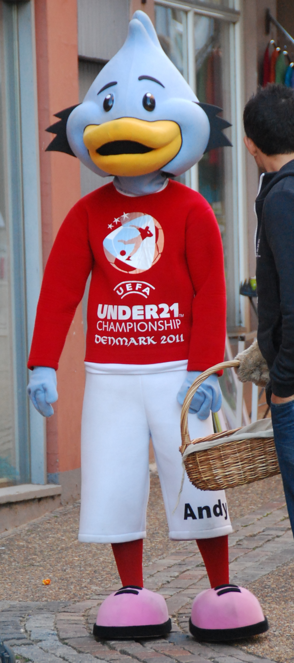 "Andy", maskotten for U-21 Europamesterskabet i fodbold 2011 i Danmark. Her set i Viborg.